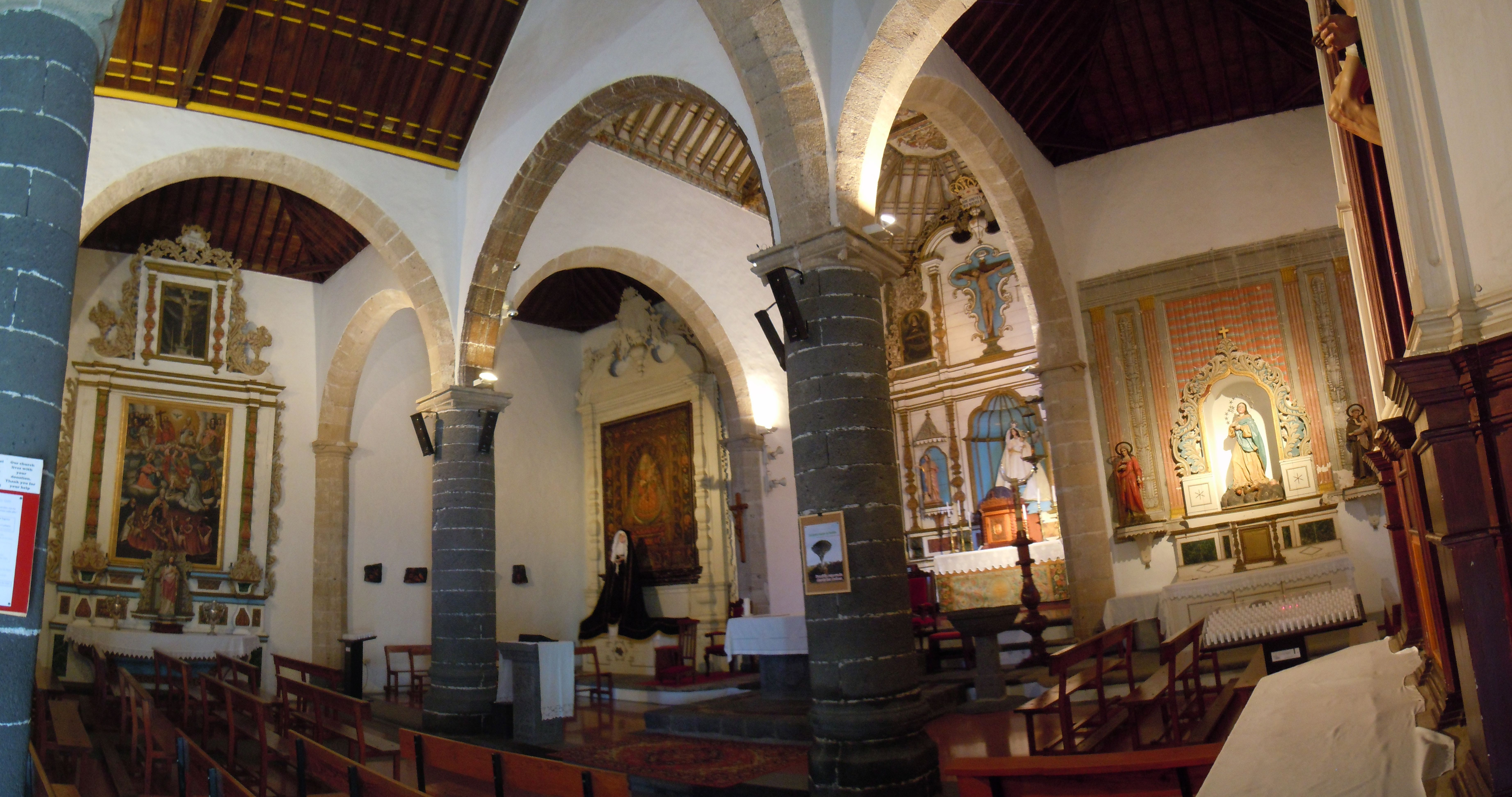 Interior of Iglesia de Nuestra Señora de los Remedios à Yaiza, Lanzarote.